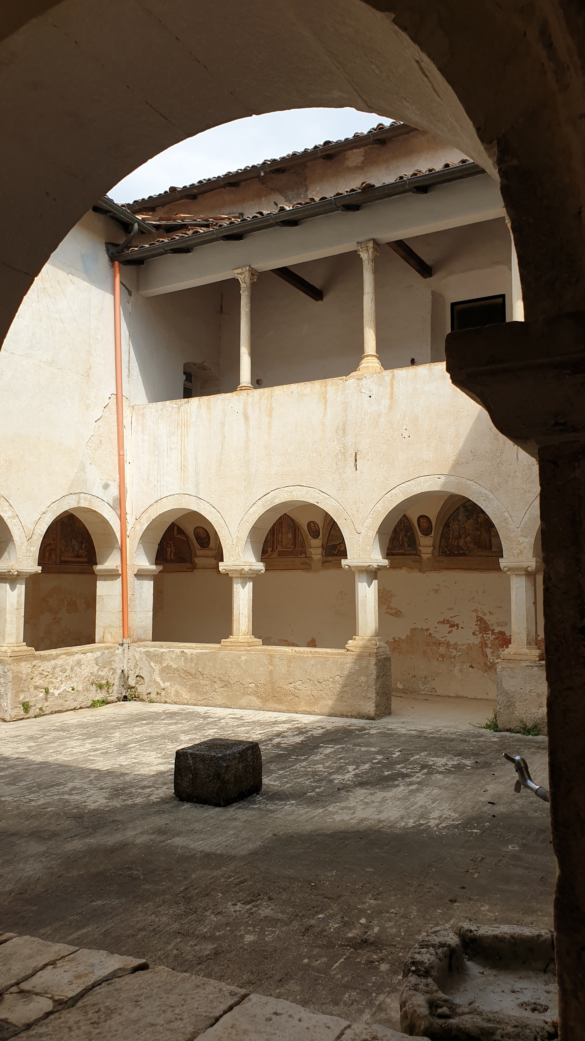 Convento di Sant'Angelo d'Ocre (AQ)